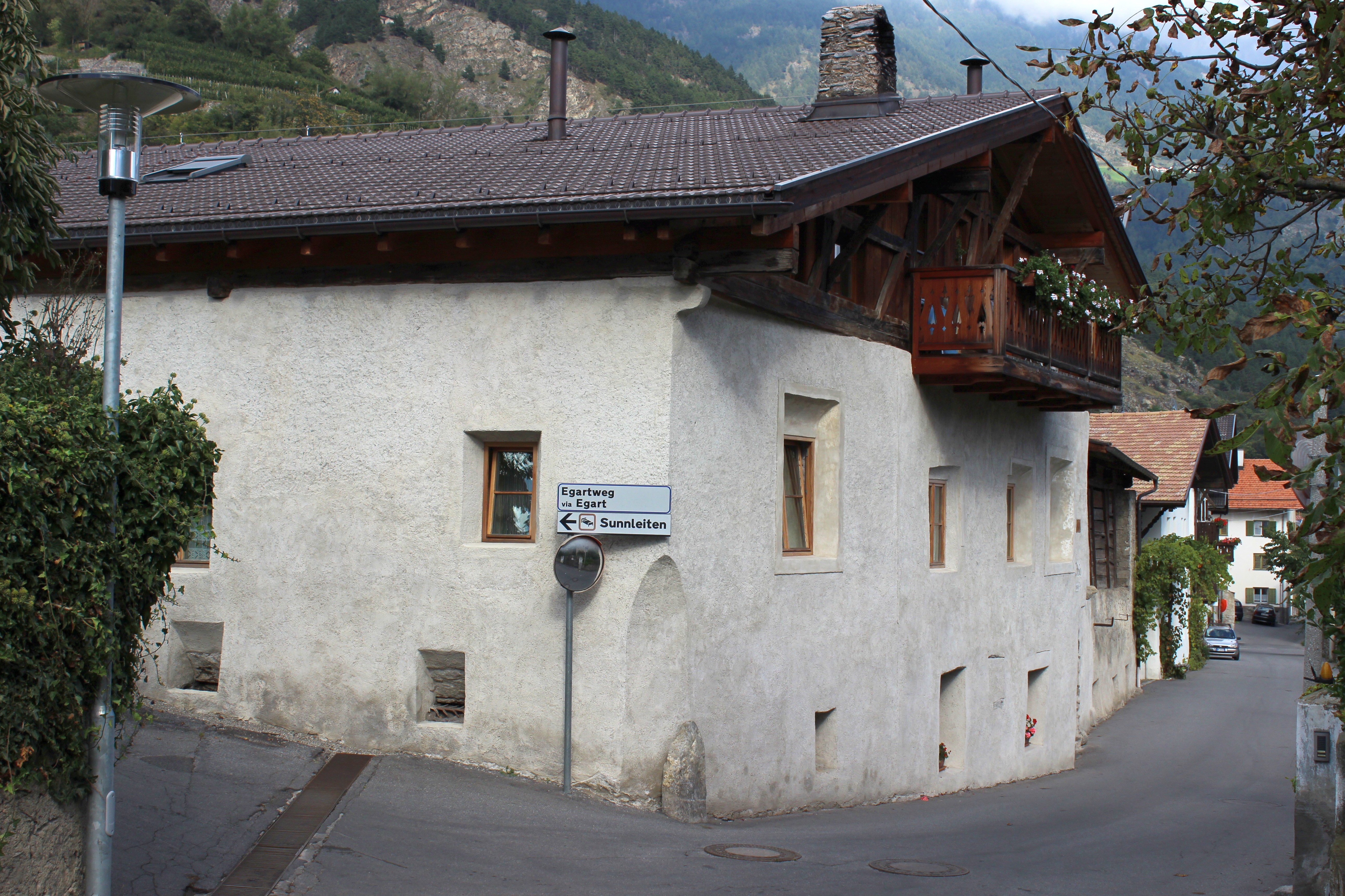 Gelser in Kortsch